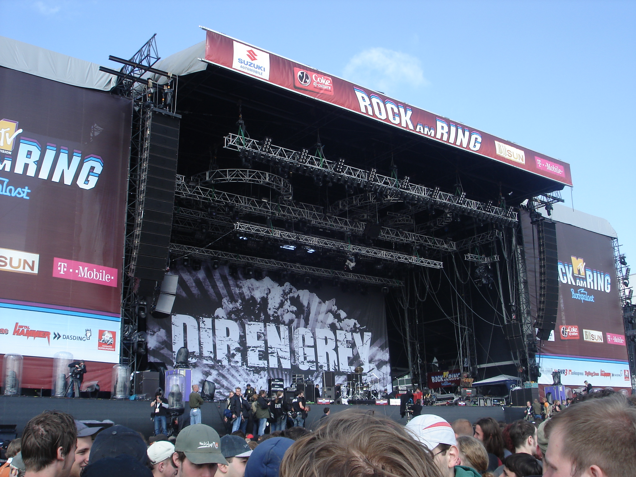 Centerstage bei Rock am Ring 2006; Auftritt von Dir En Grey